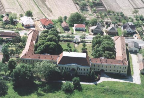 Kastelo de Anarcs.